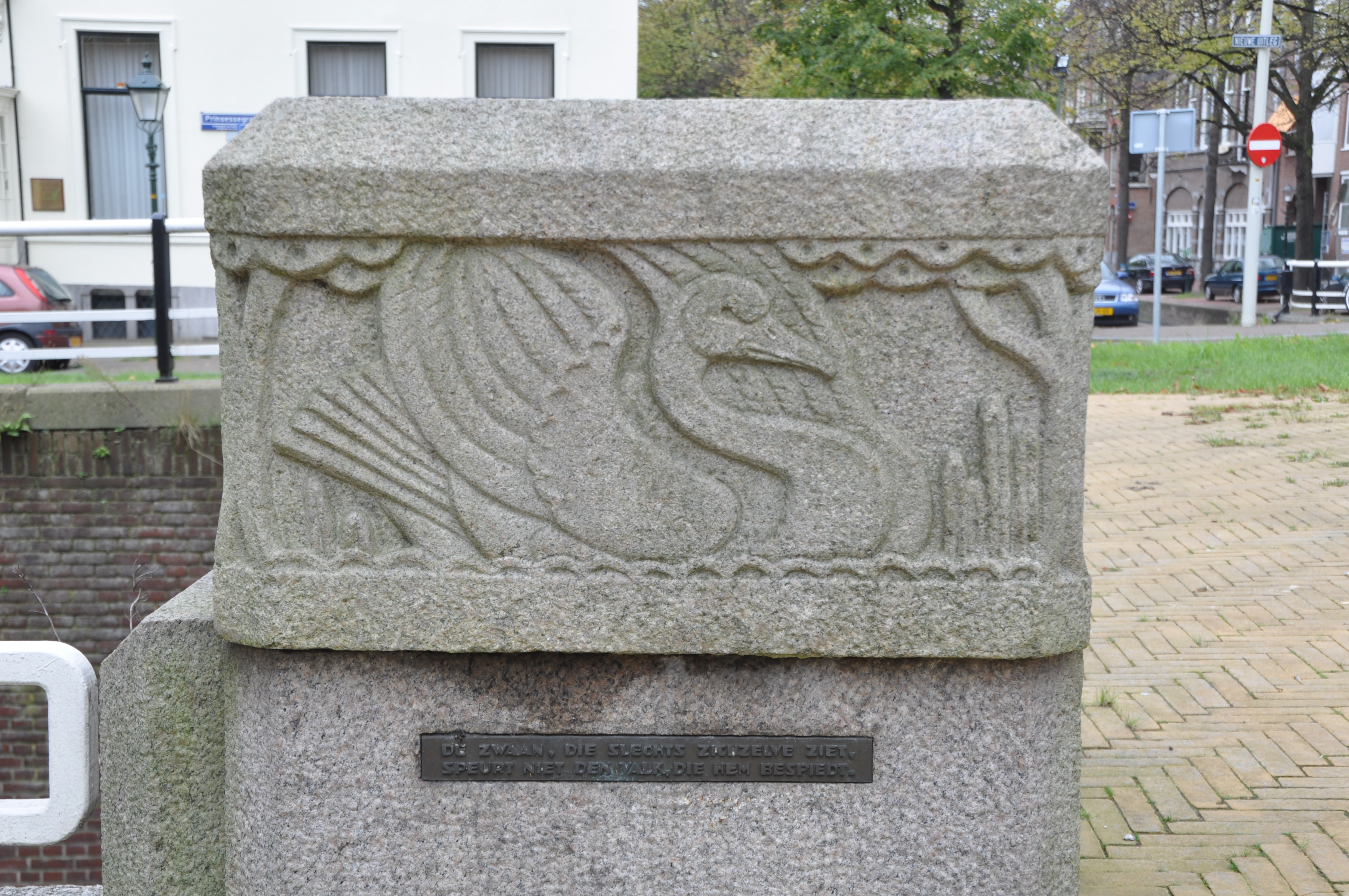 Bruggen in Den Haag.